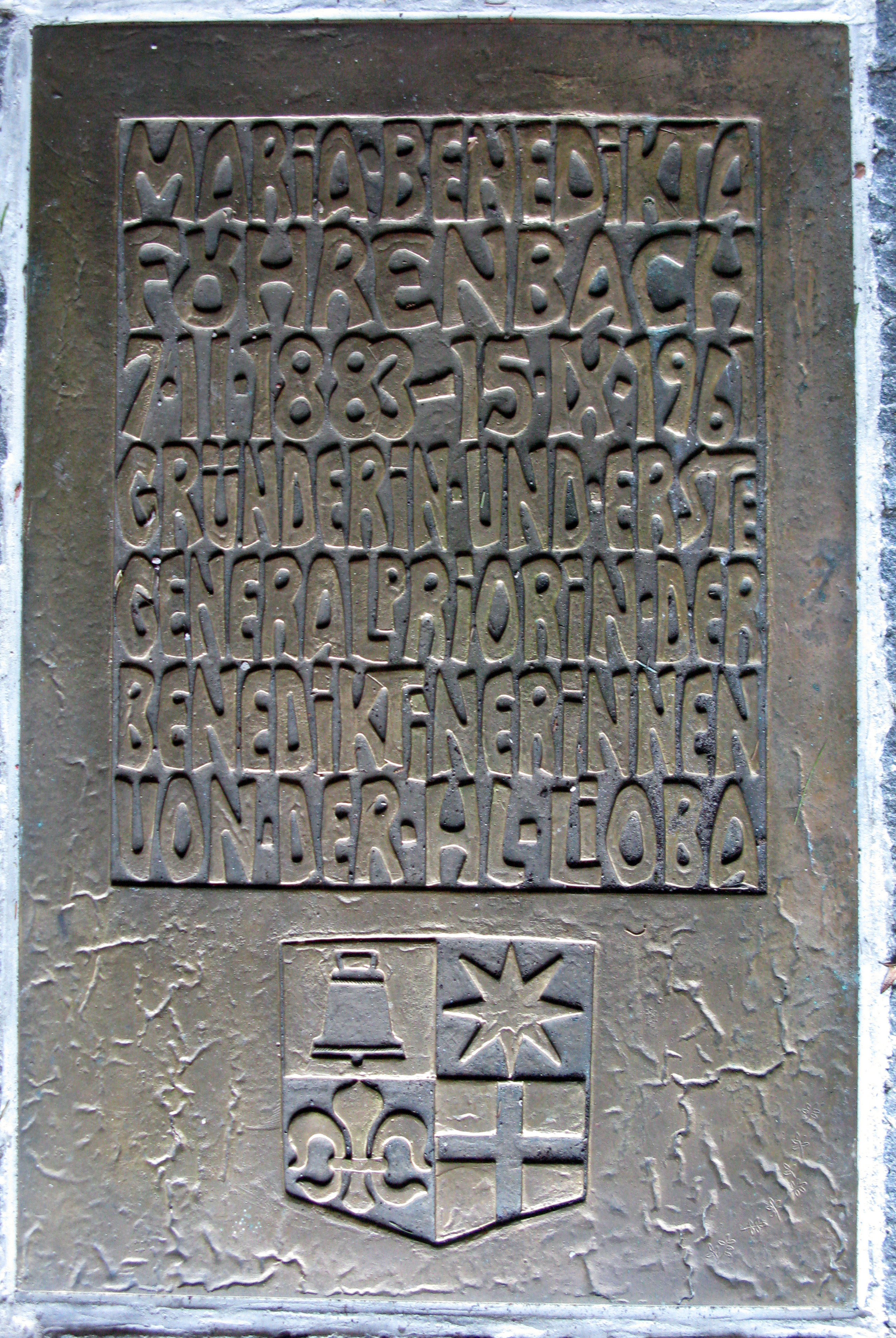 Grab von Maria Föhrenbach auf dem Friedhof des Klosters St. Lioba in Freiburg-Günterstal